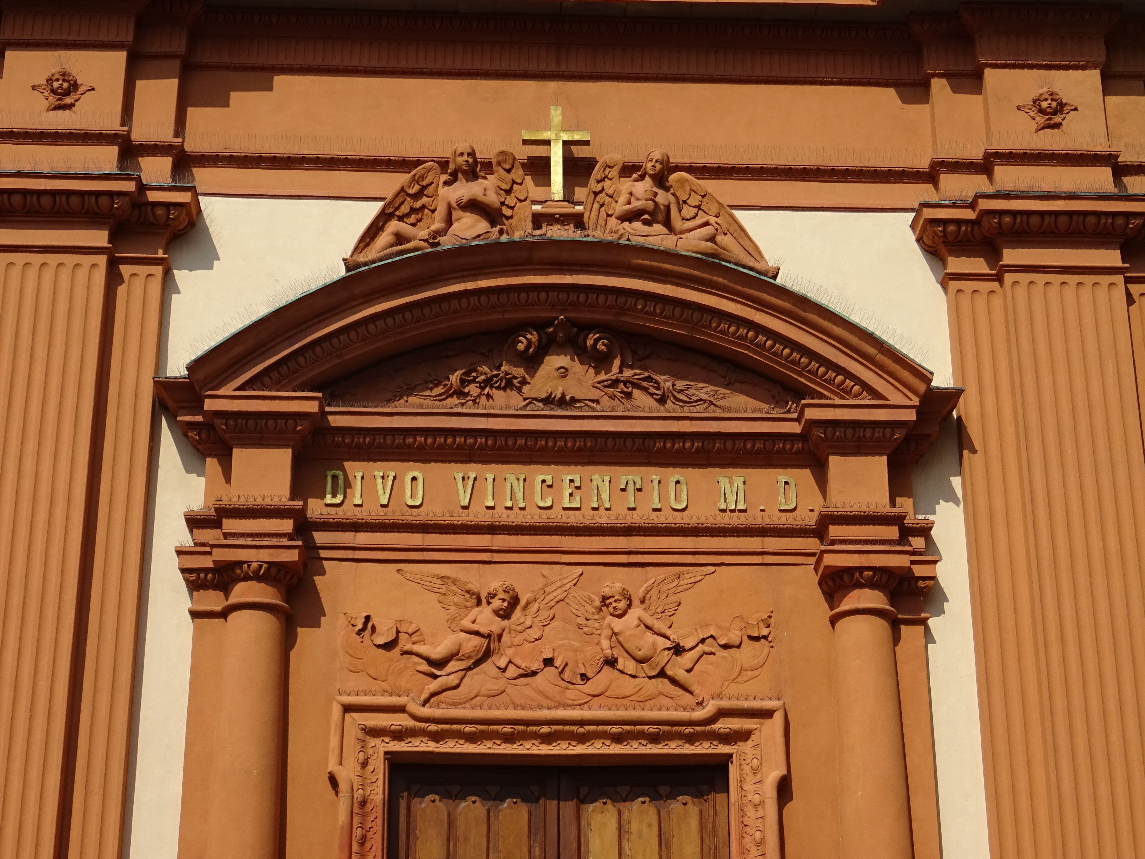 Santuario di San Vincenzo a Cernobbio